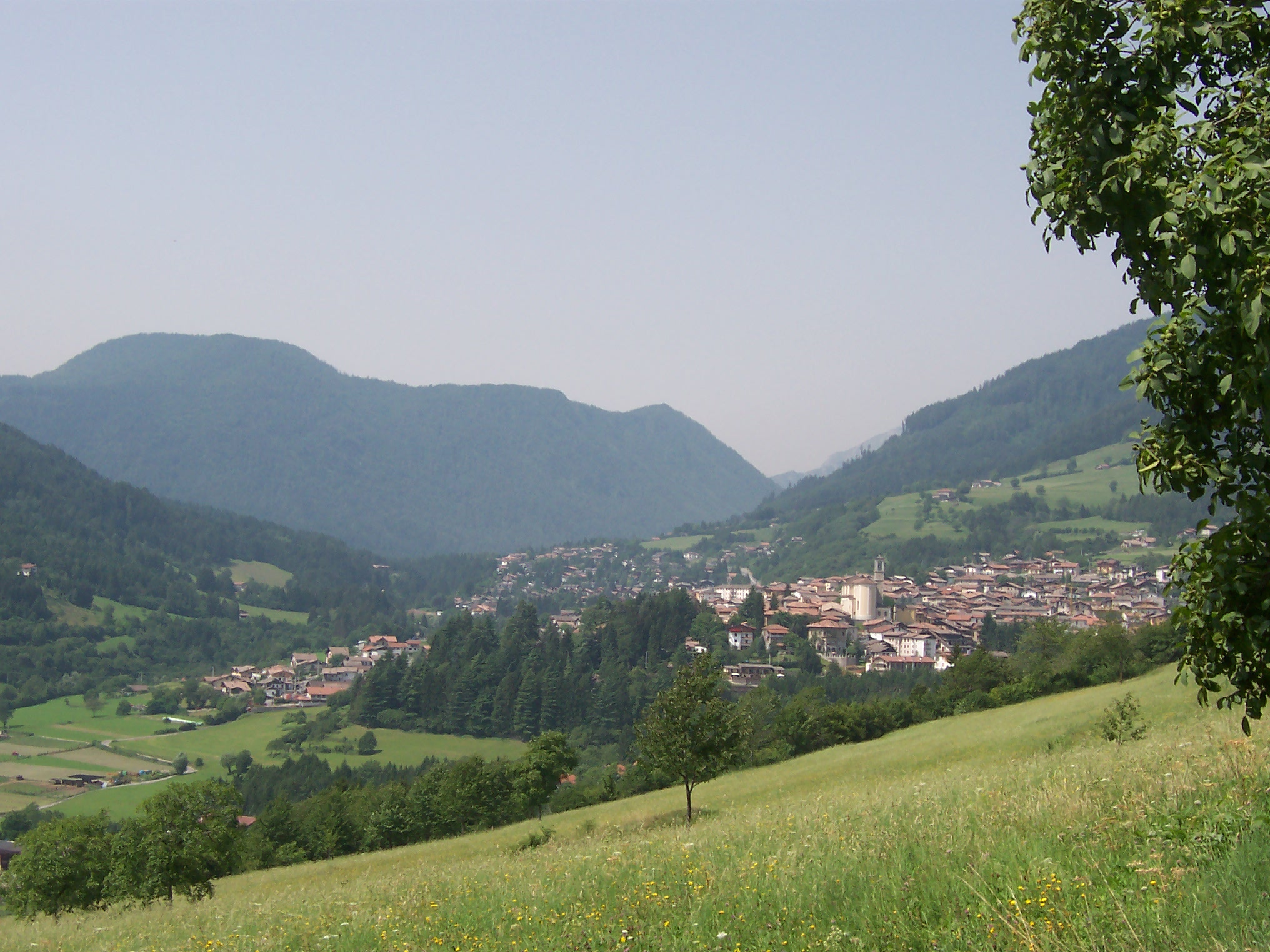 Vista su Borno dalla strada che porta a Ossimo superiore